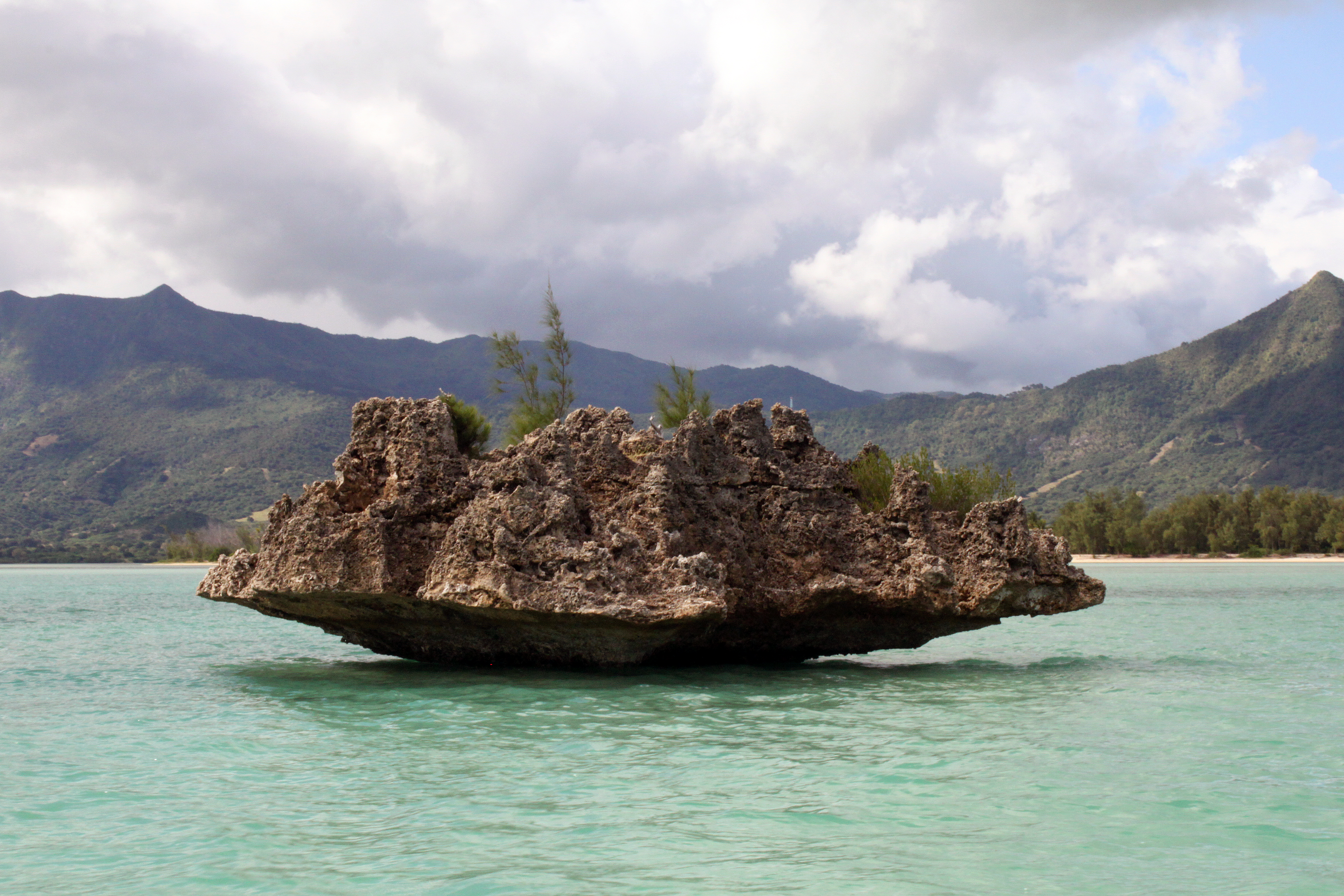 Ile aux Benitiers - Mauritius